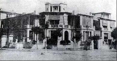 顺直水利委员会地址旧照